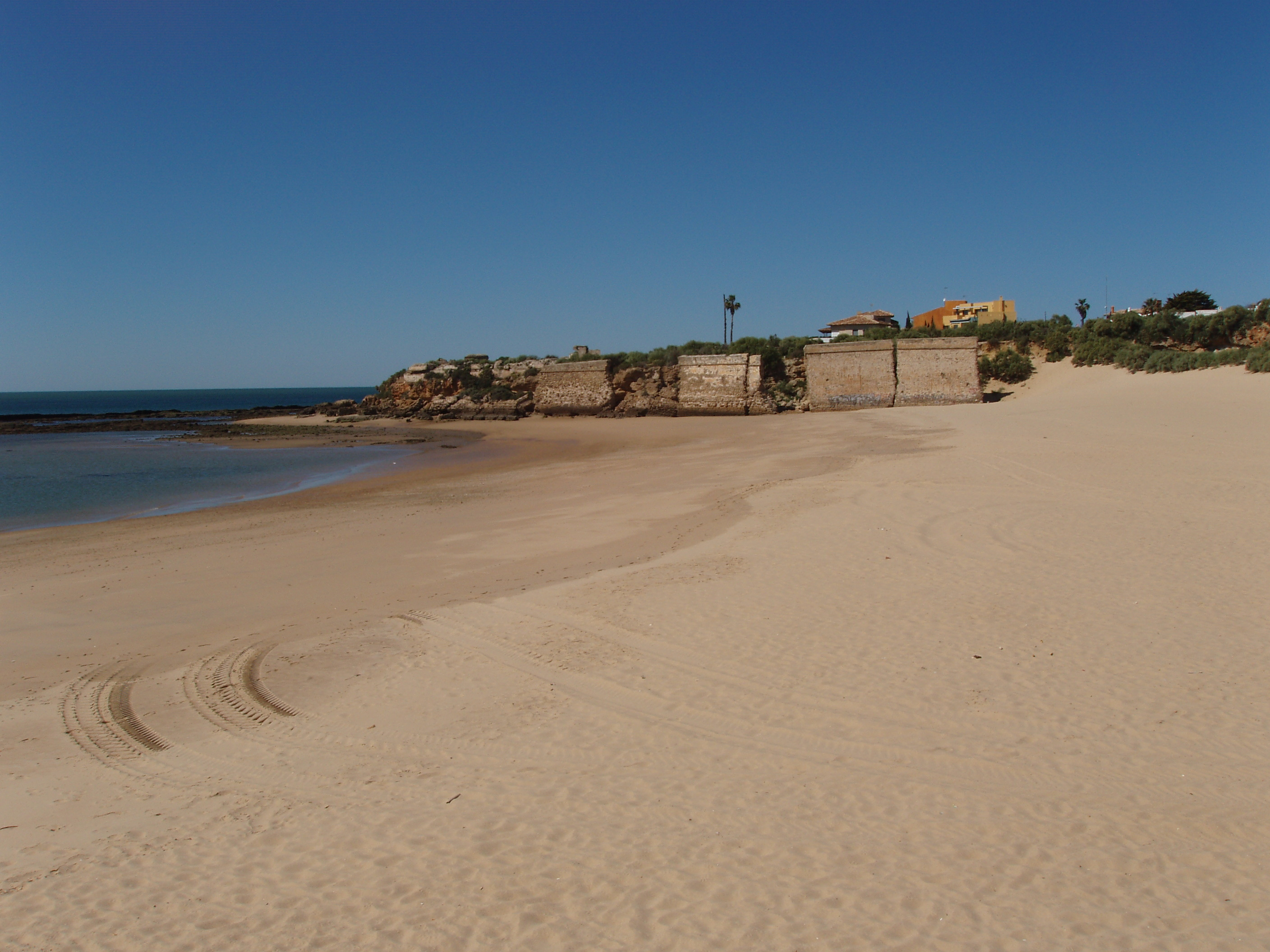 Playa de La Muralla. El Puerto de Santa María, Cádiz, España.